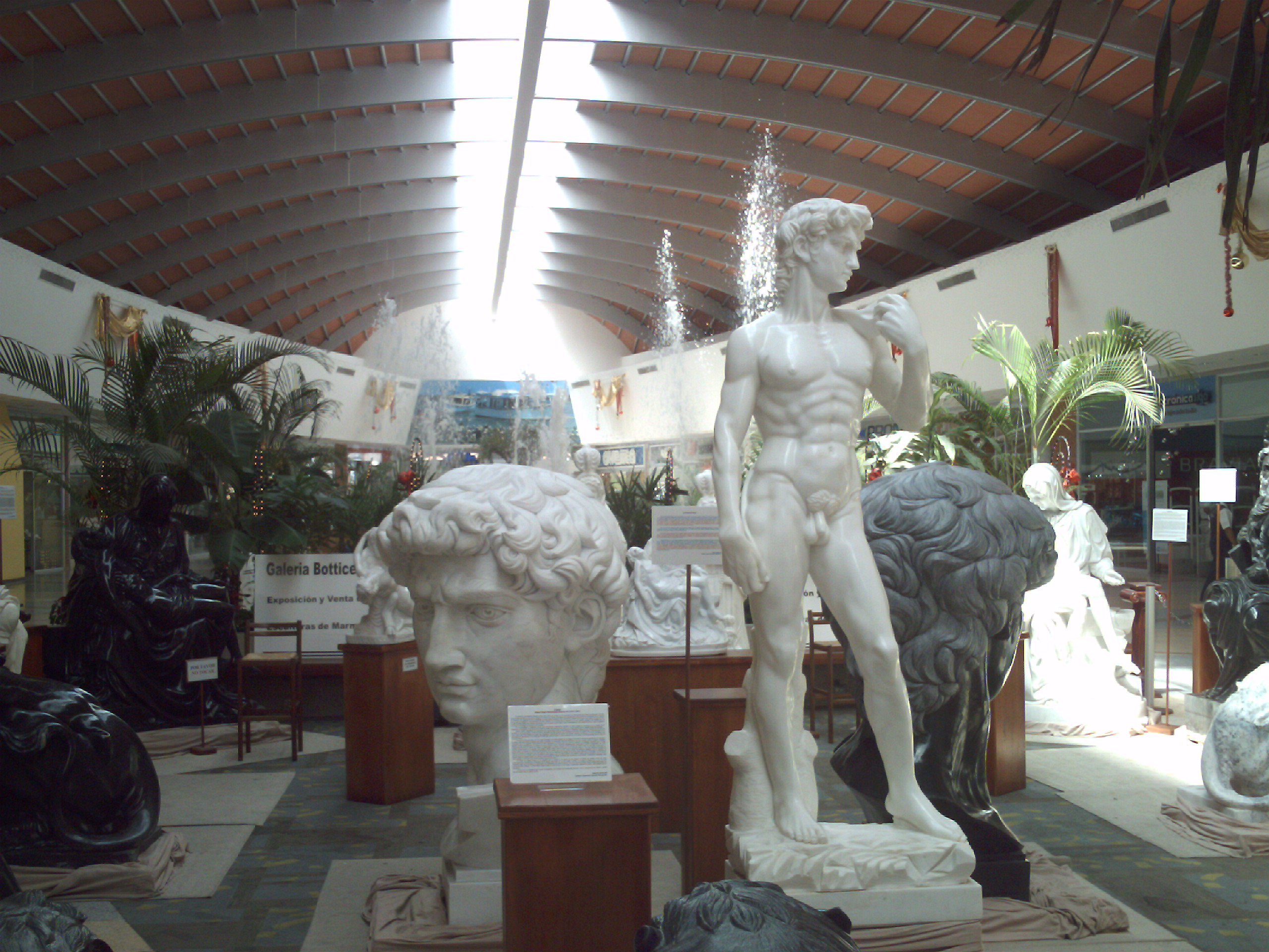 Galería de arte en el SAMBIL Margarita, isla de Margarita, Nueva Esparta, Venezuela.